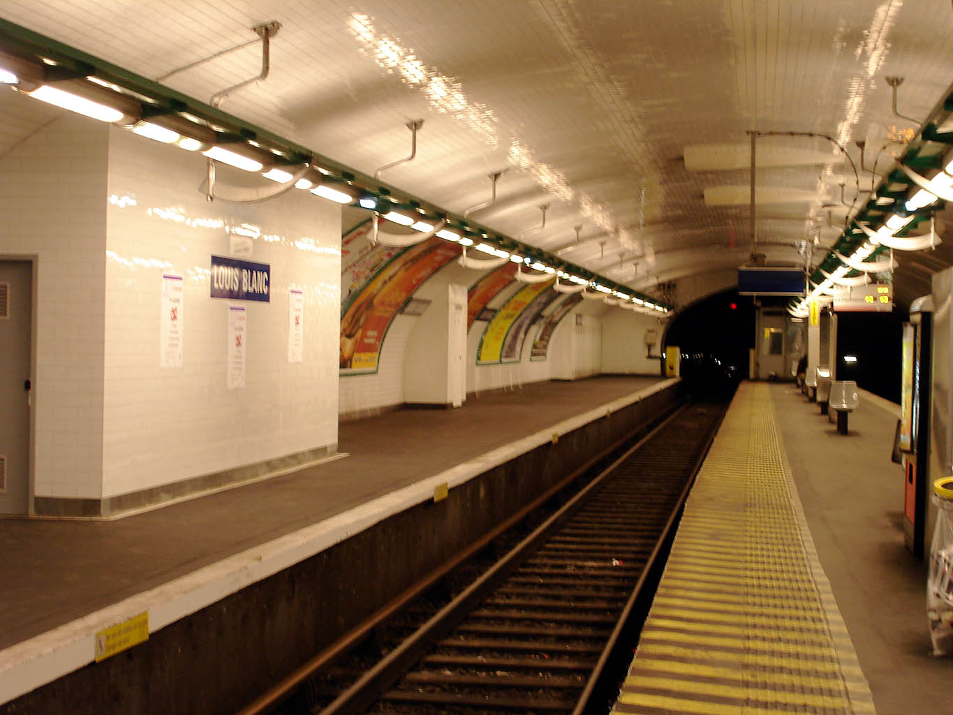 Station Louis Blanc de la ligne 7 du métro de Paris, France.